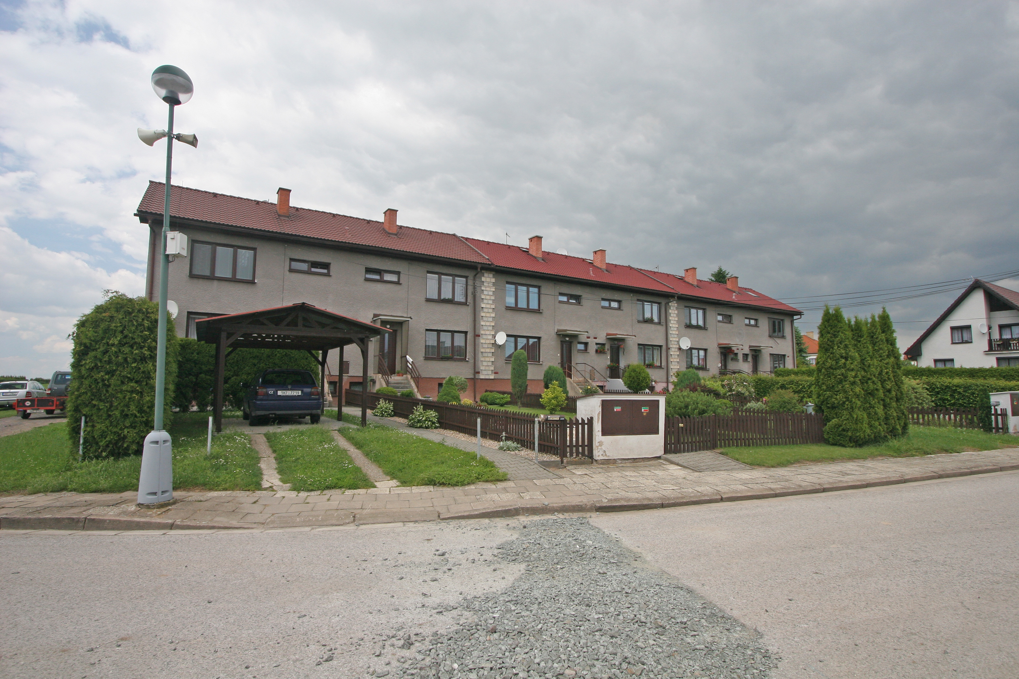 Střezetice čp. 66